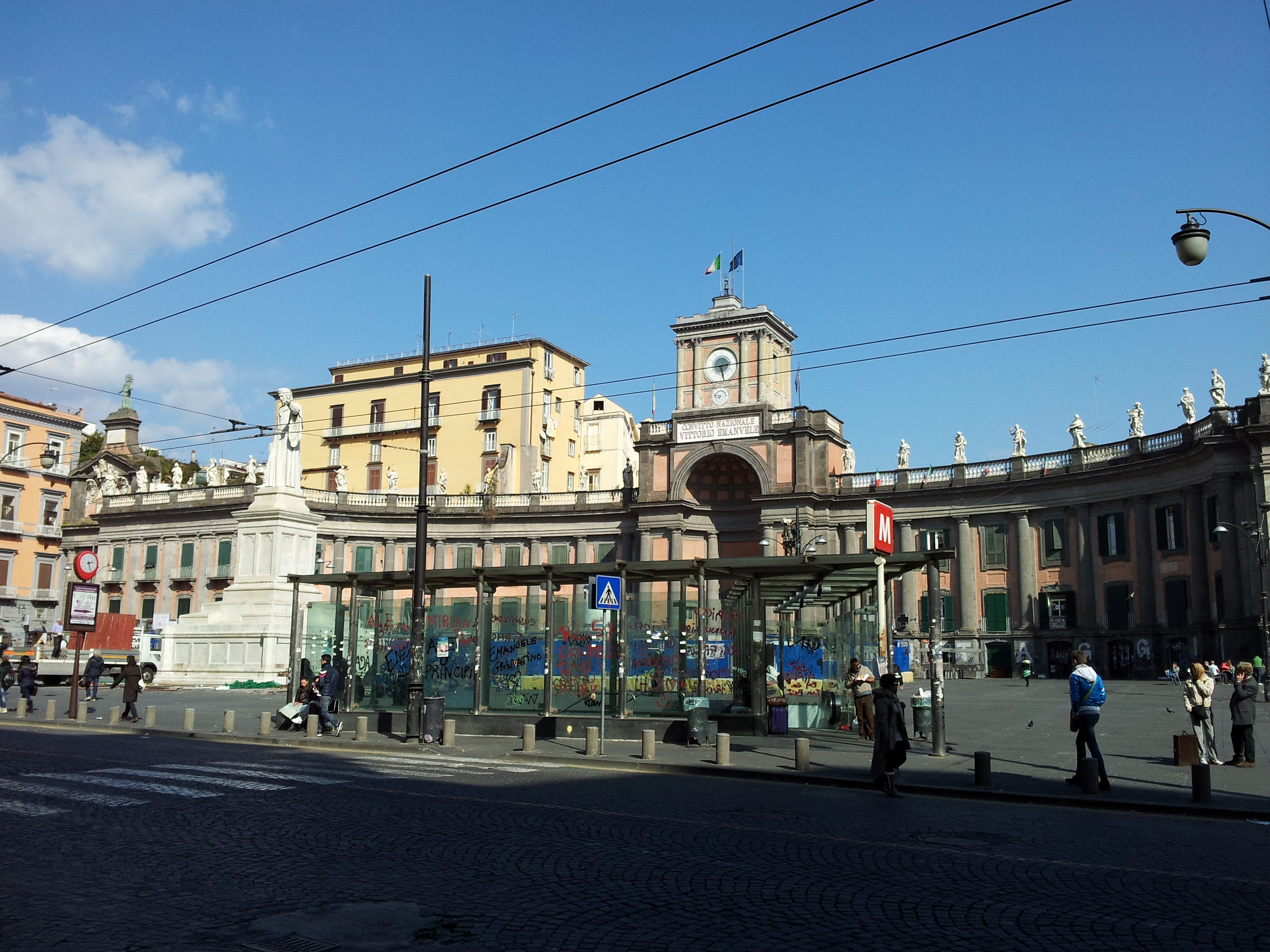 Piazza Dante (Napoli) A sinistra si vede la parte superiore di Port'Alba. Al centro vi è il monumento scultoreo raffigurante Dante Alighieri. E sul fondo, caratterizza la piazza il Foro Carolino (opera quest'utiltima che vede la facciata sulla piazza progettata da Luigi Vanvitelli)